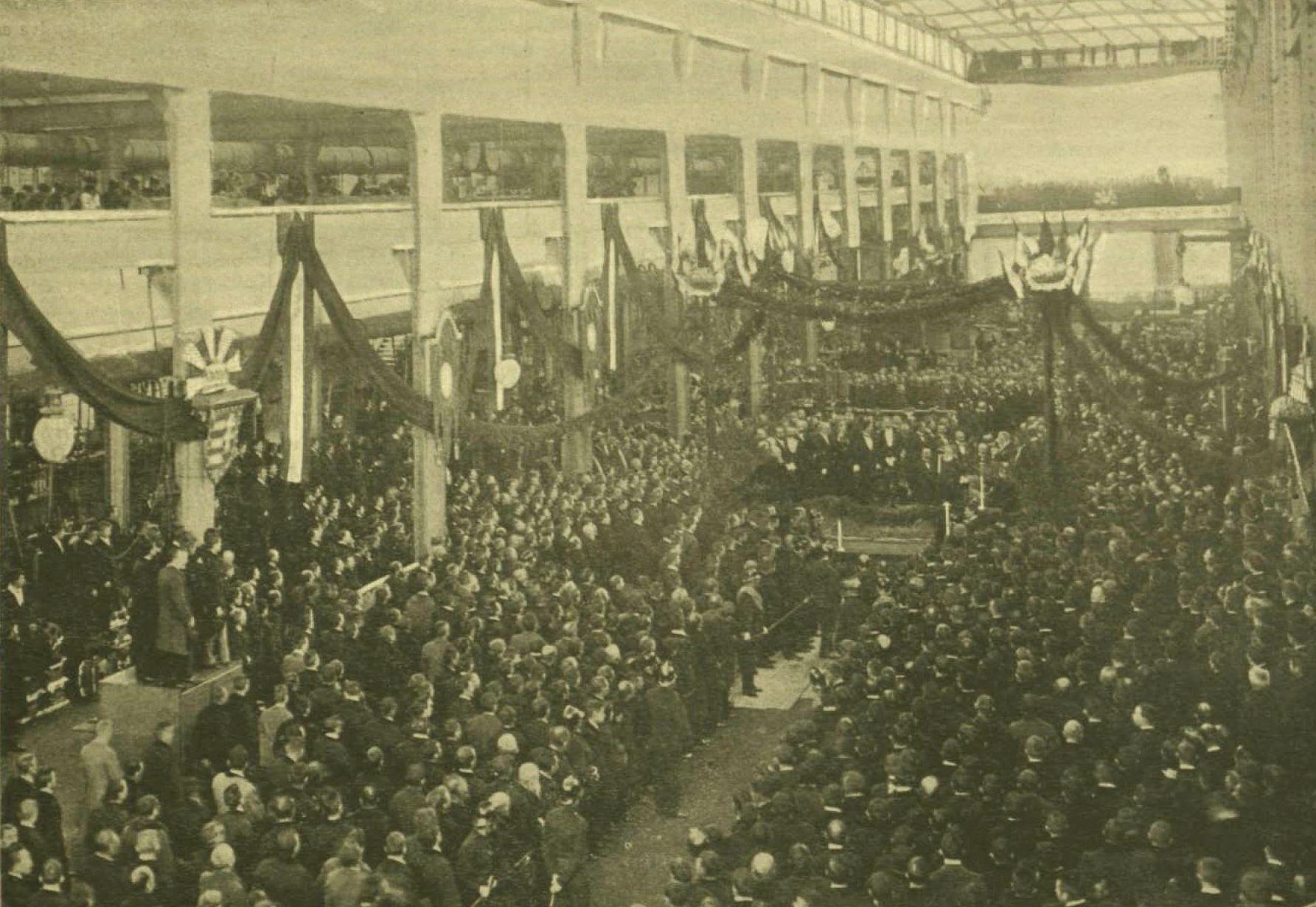 Jubileumi ünnepély a Ganz-gyárban Mechwart András hivatalba lépésének 40-ik évfordulóján. Vasárnapi Ujság 46. évf. 51. sz. (1899. december 17.)